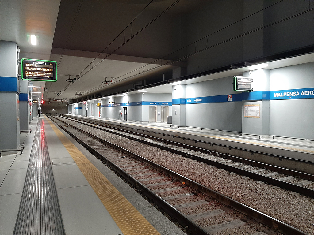 Stazione ferroviaria di Malpensa T2, i binari.